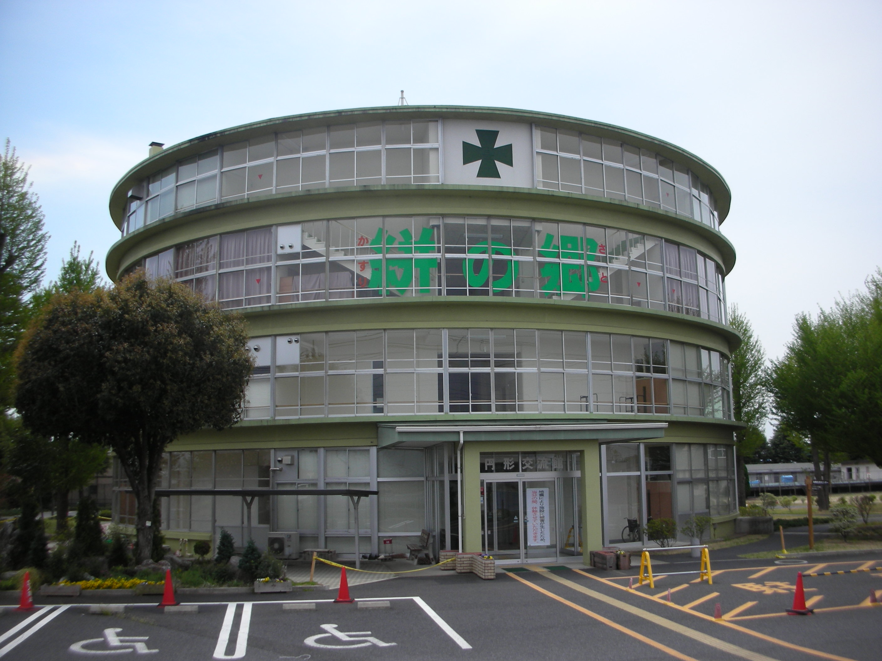 絣の郷（旧伊勢崎市立女子高等学校）の外観。